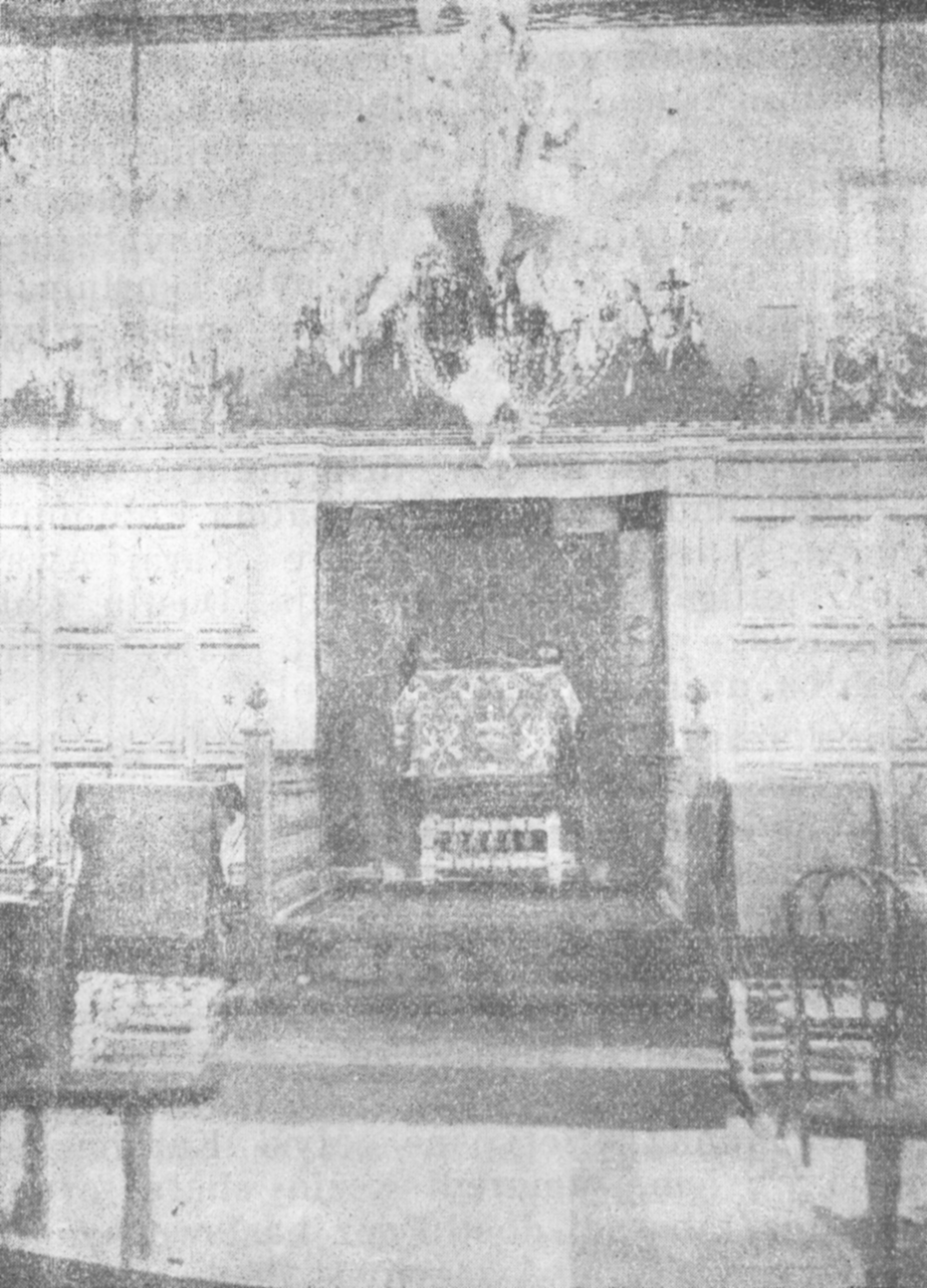 Караимская кенасса в Феодосии. Гехал